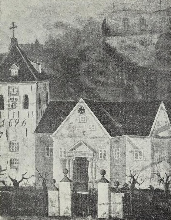 Bragernes gamle kirke på et maleri fra ca. 1800. Fra Tor Pedersen: «Drammen 1811–1911» (Harald Lyche, 1911), s. 83.